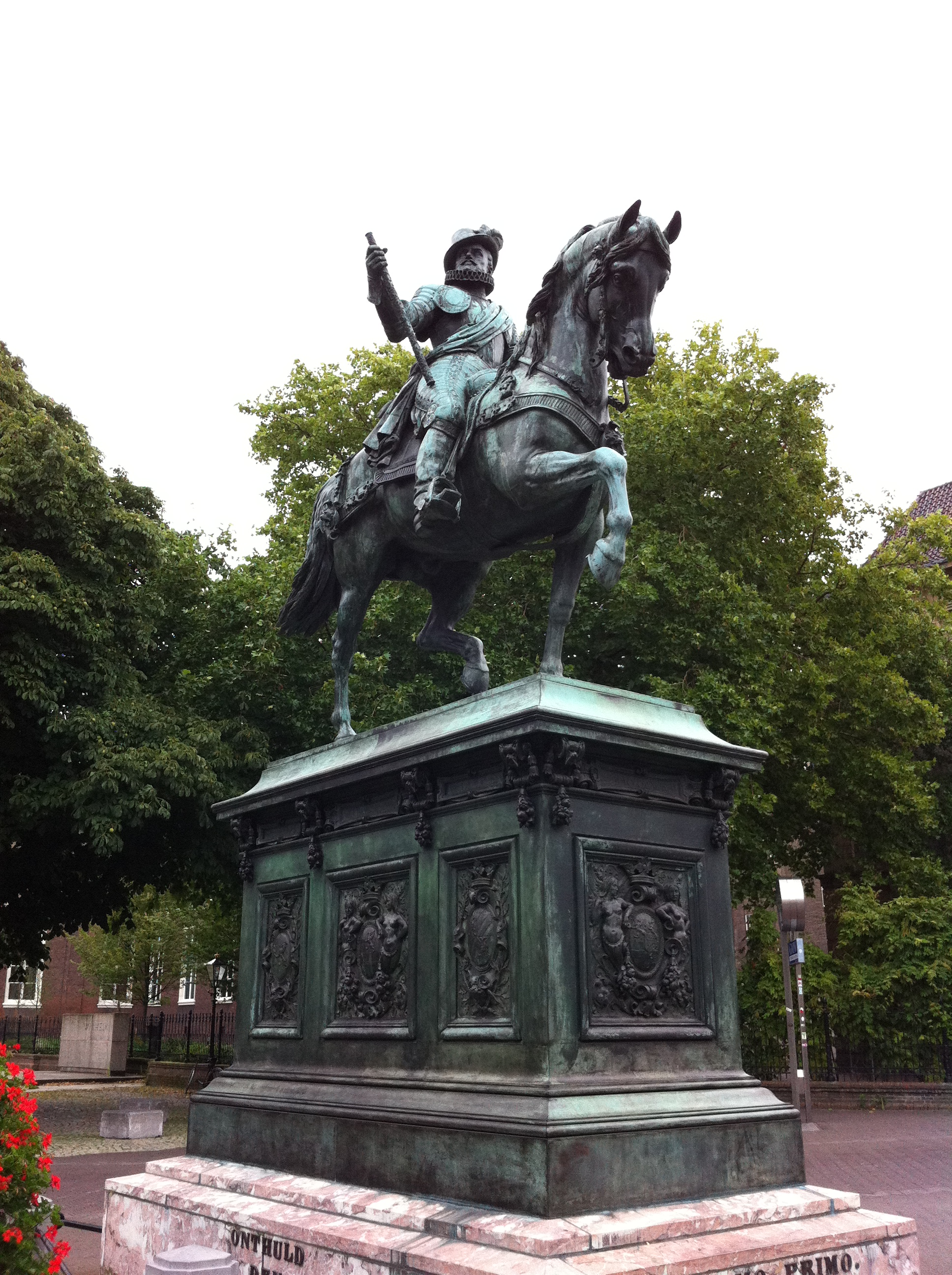 Statue équestre devant le Palais de Noordeinde, à La Haye